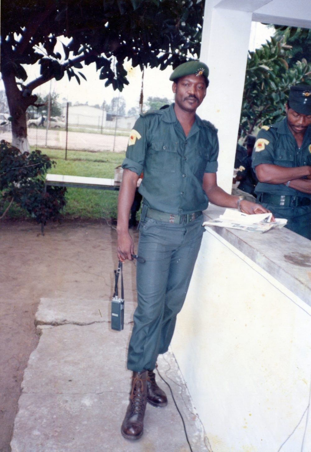 Le général Denis Lango Topkwi, commandant de la Garde Civile Zairoise en 1985. Il disparait en octobre 1997 après la prise de pouvoir de Kabila, avant d'être libéré en 2000: [1].